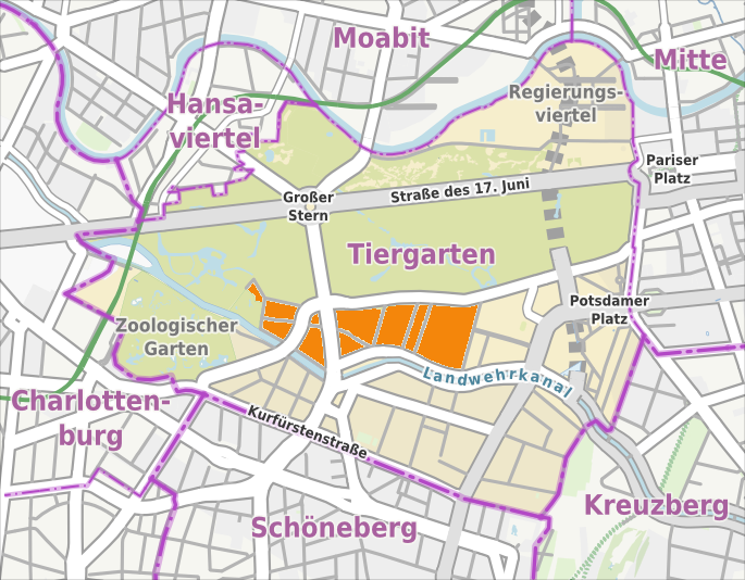 Karte des Botschaftsviertels in Berlin, Quartier in Berlin-Tiergarten